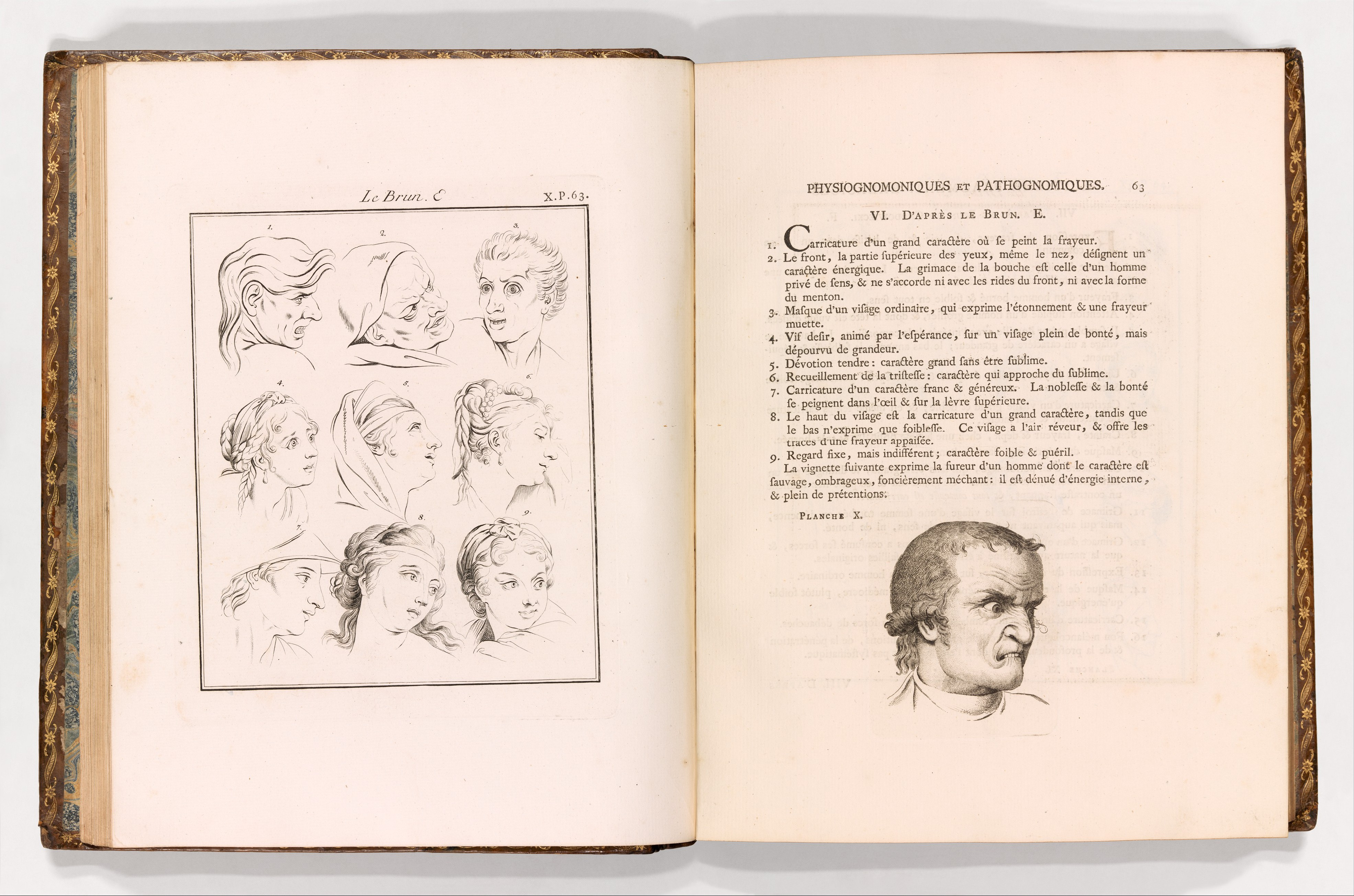 Book; Books